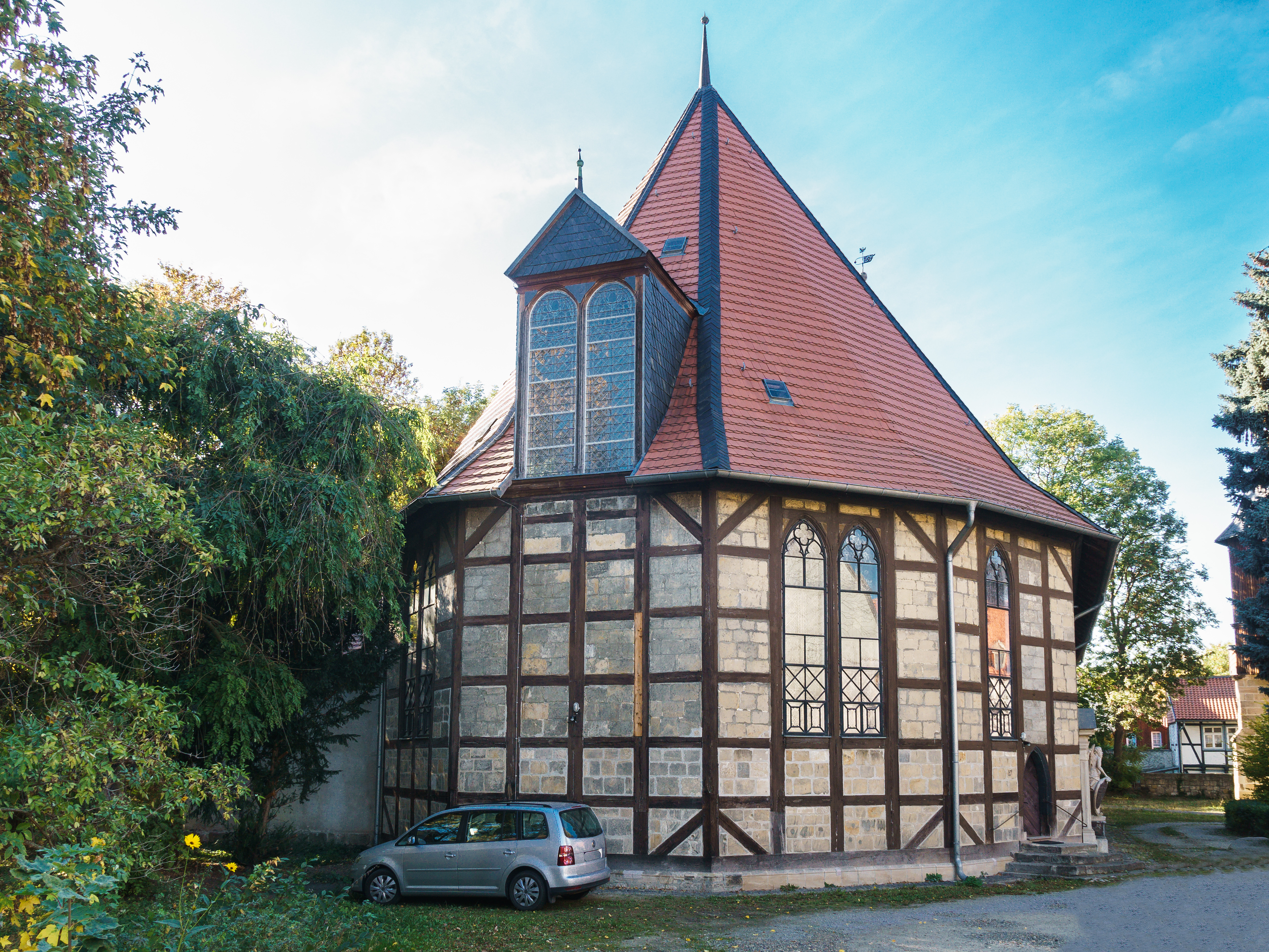 St. Johannis, eine der größten Fachwerkkirchen Deutschlands, Westendorf in Halberstadt